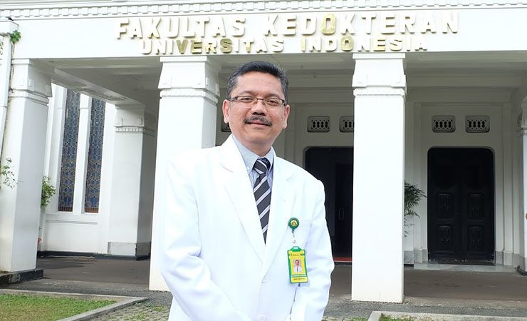 Potret resmi Ari Fahrial Syam sebagai Dekan FKUI